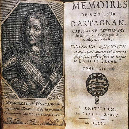 Mémoires de Mr. d'Artagnan, Capitaine lieutenant de la première compagnie des mousquetaires du roi, contenant quantité de choses particulières et secrètes ... passées sous le règne de louis... Seigneur d' Artagnan Charles de Batz